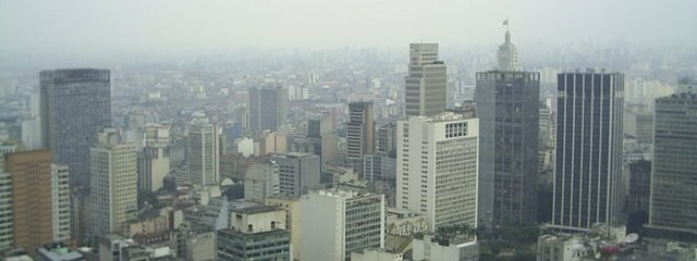 Panorama do centro de São Paulo.